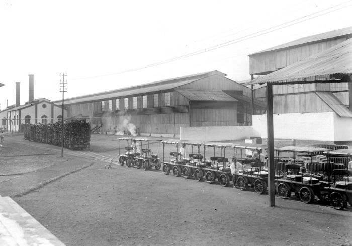 Negatief. Gezicht op de Suikerfabriek Djatiroto, Pasoeroean